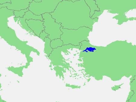 In dutch: Locatie Zee van Marmara.PNG